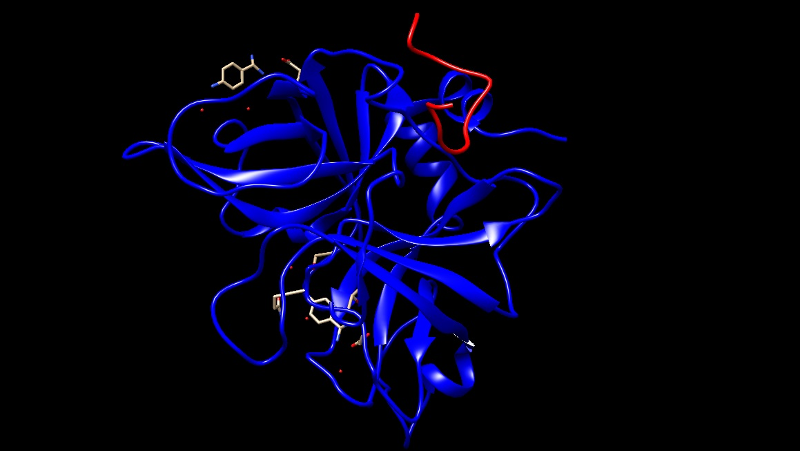 Estructura Acrosina